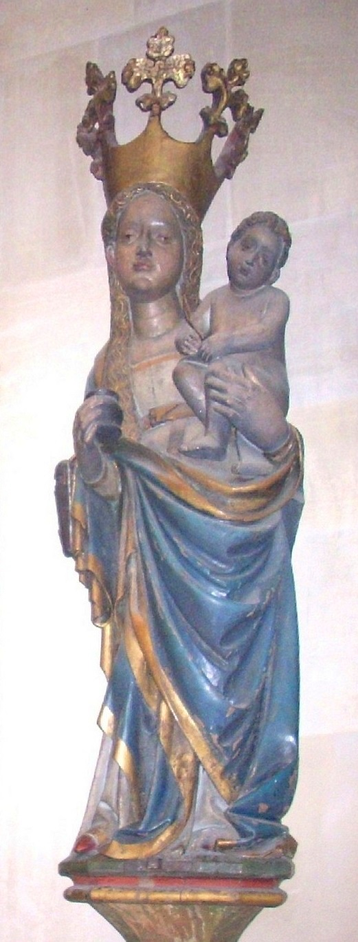 Hildesheimer Dom, Tintenfassmadonna